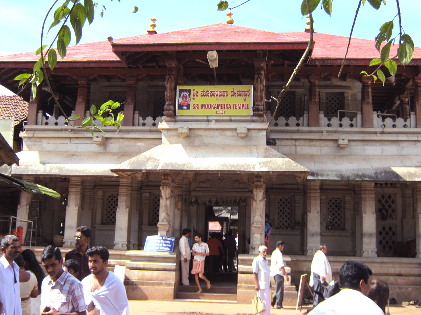 ശ്രീ മൂകാംബിക ക്ഷേത്രത്തിന്റെ കവാടം